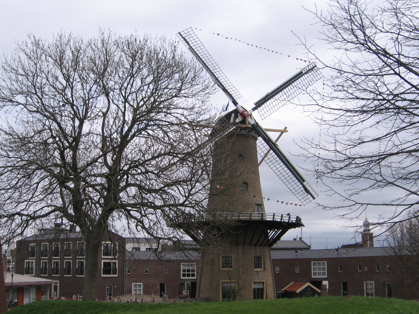 Molen De Hoop, Hellevoetsluis